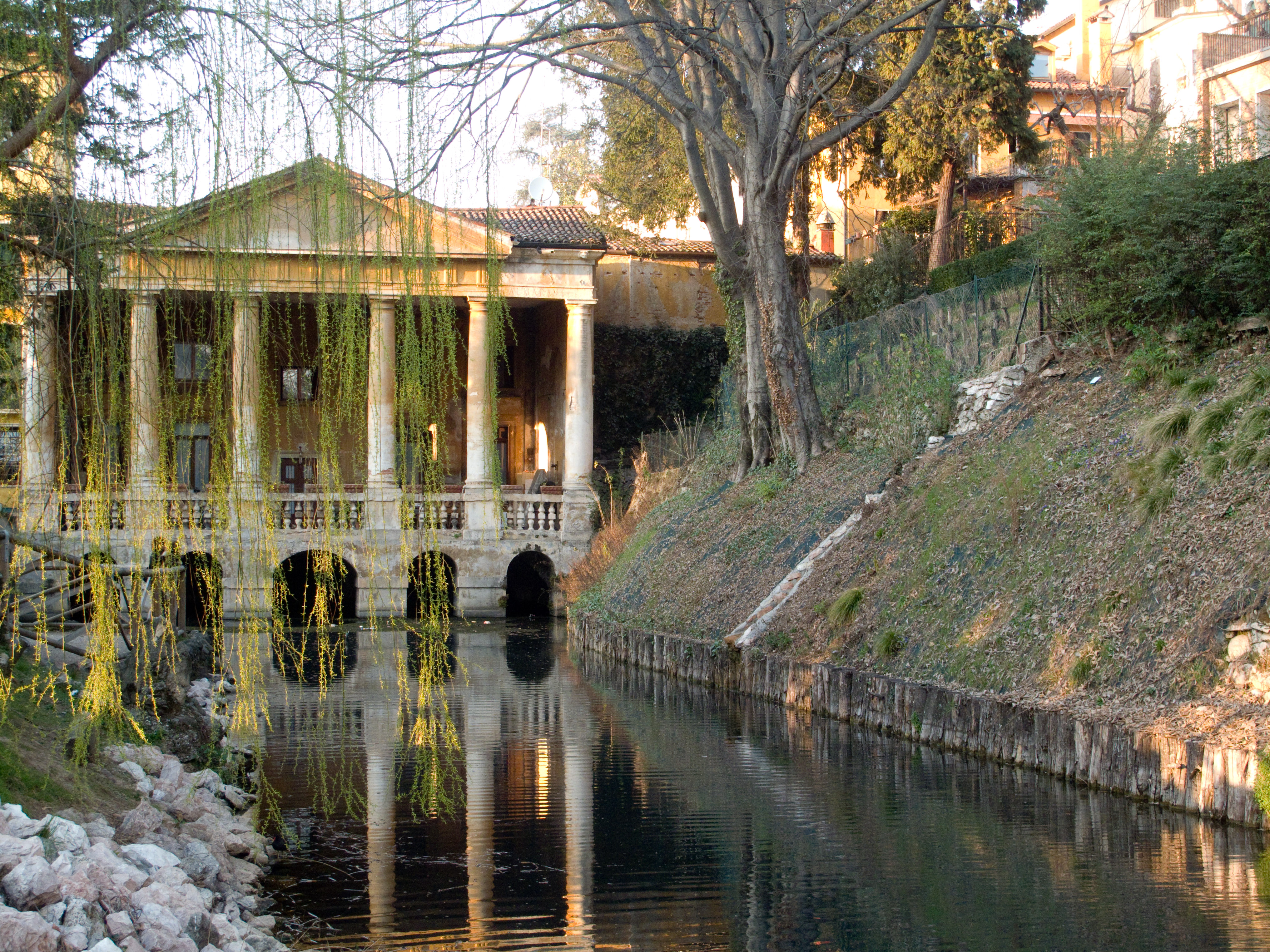 Loggia Valmarana si affaccia sulla roggia Seriola ai Giardini Salvi